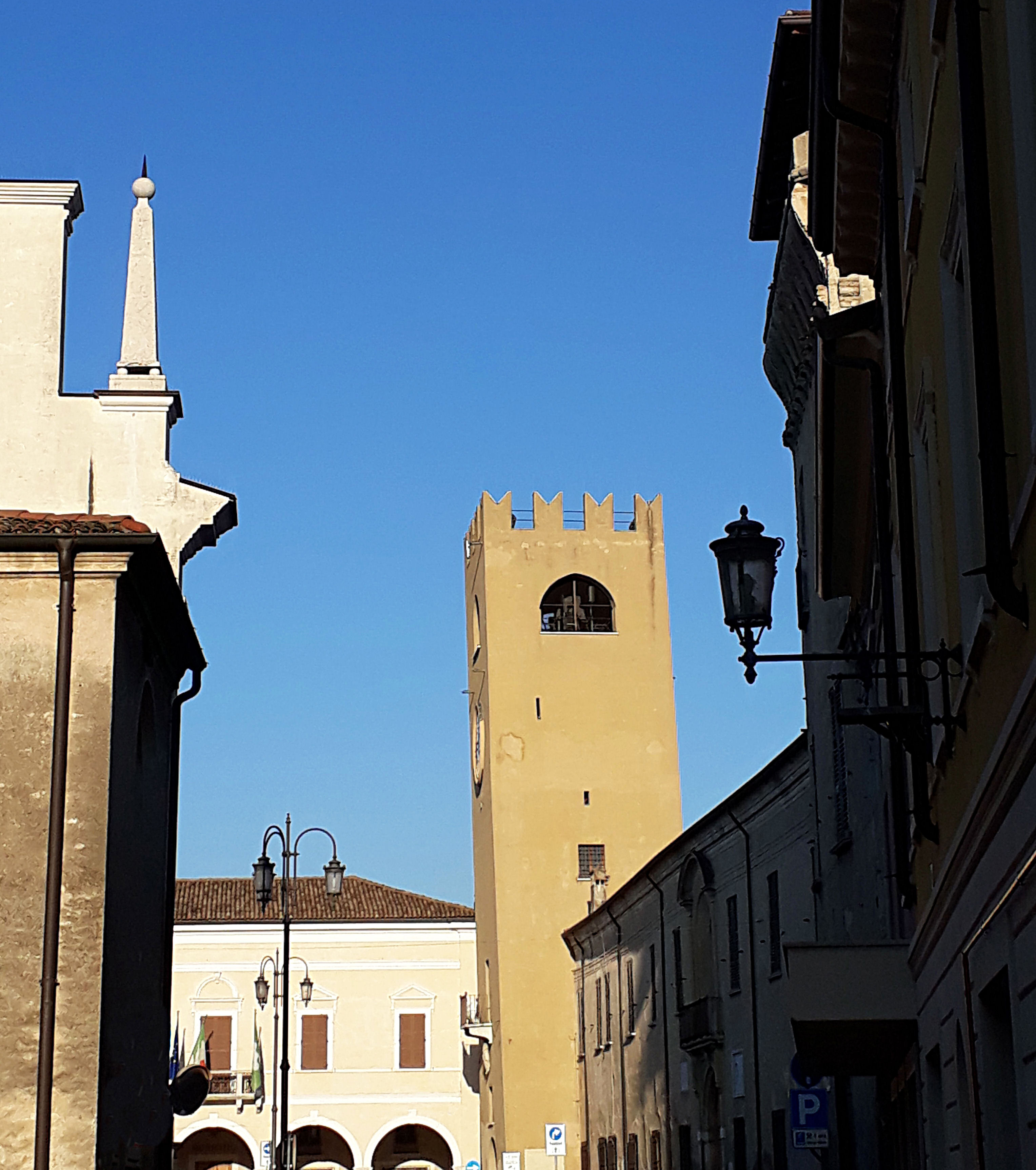 Torre civica di Castel Goffredo This is a photo of a monument which is part of cultural heritage of Italy.